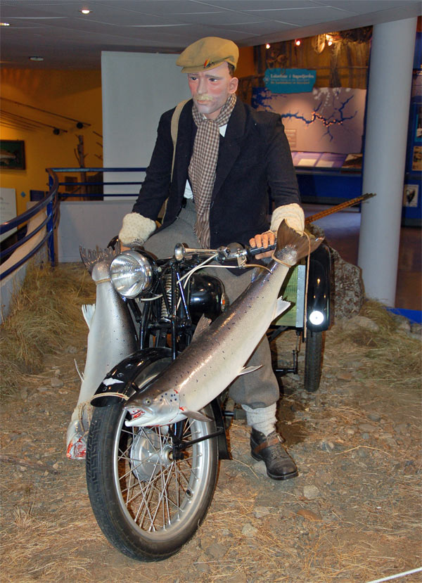 Lachsfischer mit Moped. Model im Norsk Villakssenter